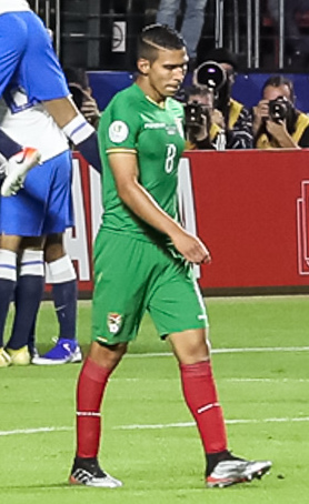 (São Paulo - SP, 14/06/2019) Celebração do gol da seleção Brasileira de Futebol. Foto: Marcos Corrêa/PR